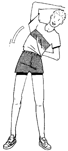 Souplesse exercice de tronc-flexion latérale.png